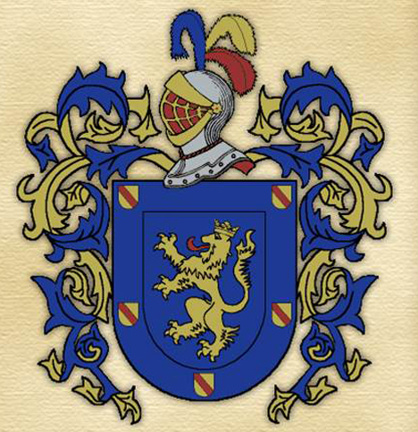 En azur, un león, rampante, de oro, coronado de lo mismo y linguado, de gules. Bordura cosida con cinco escudetes, de oro, cargado cada uno de ellos de una banda, de gules.